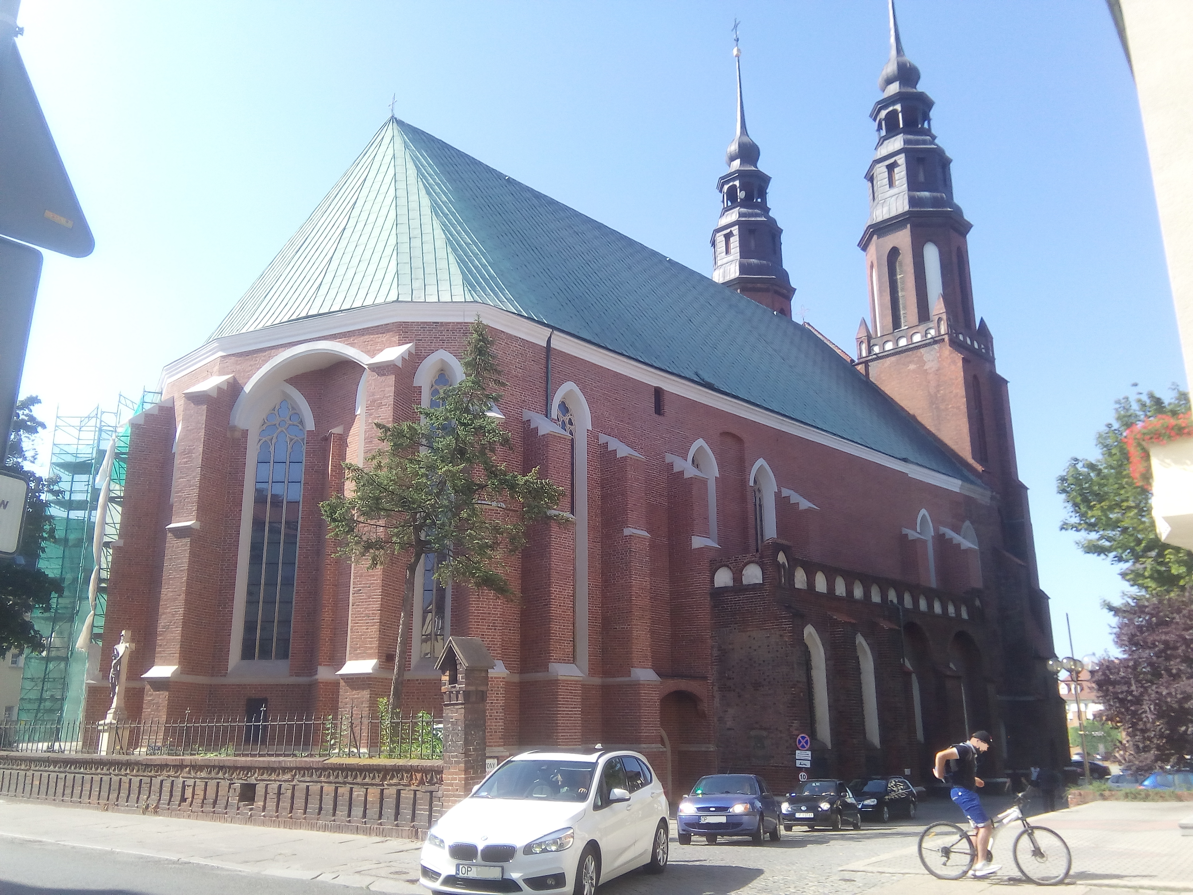 Katedrála Svatého Kříže v Opole